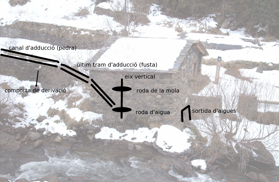 Estructura i funcionament d'una mola catalana amb roda hidràulica. Mas d'en Solé (La Cortinada, Andorra).